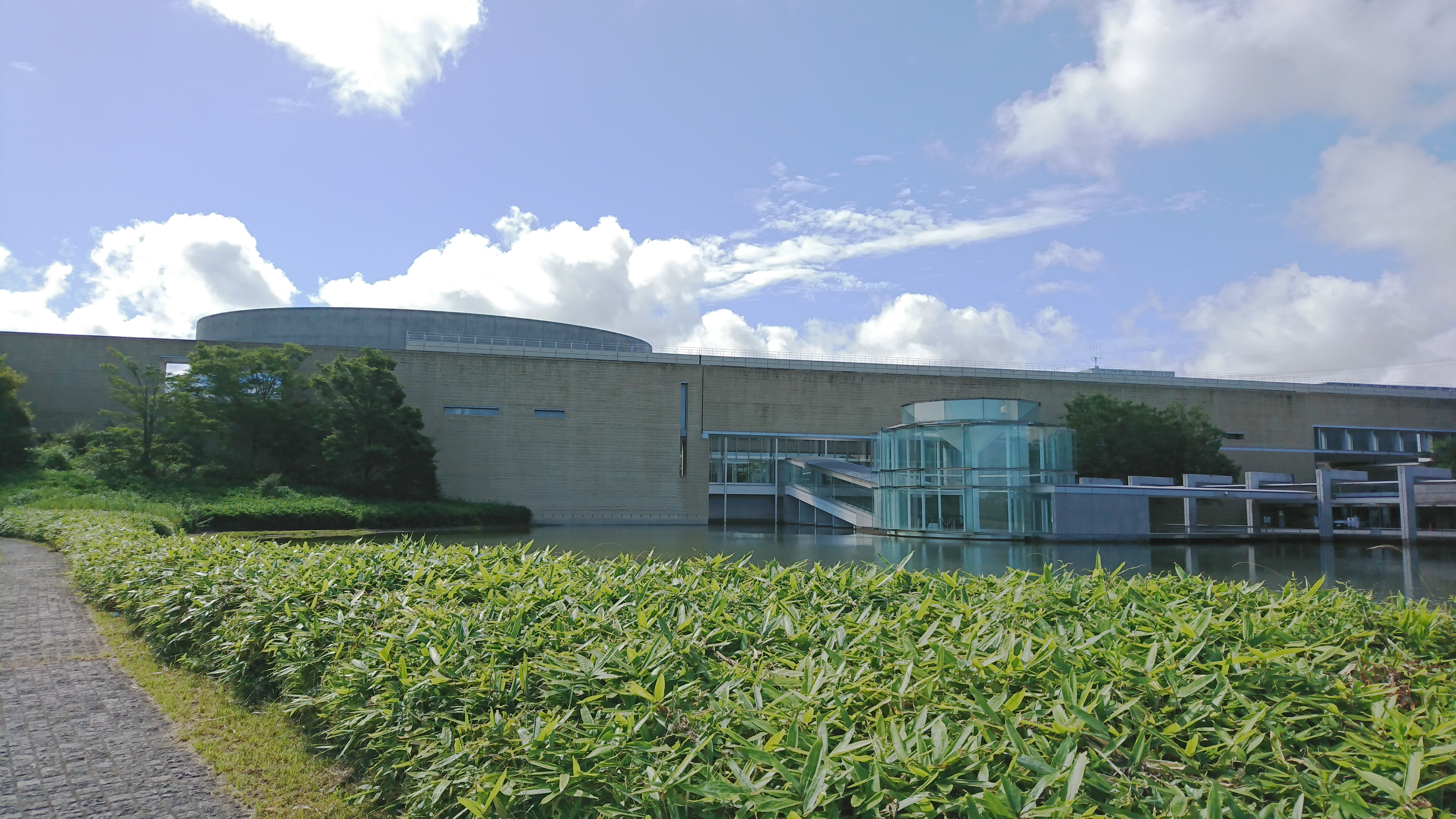 千葉県木更津市にあるかずさアカデミアホール。